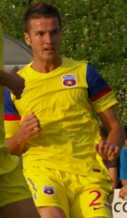 Andrei Dumitras ist eine Spieler von Steaua Bukarest